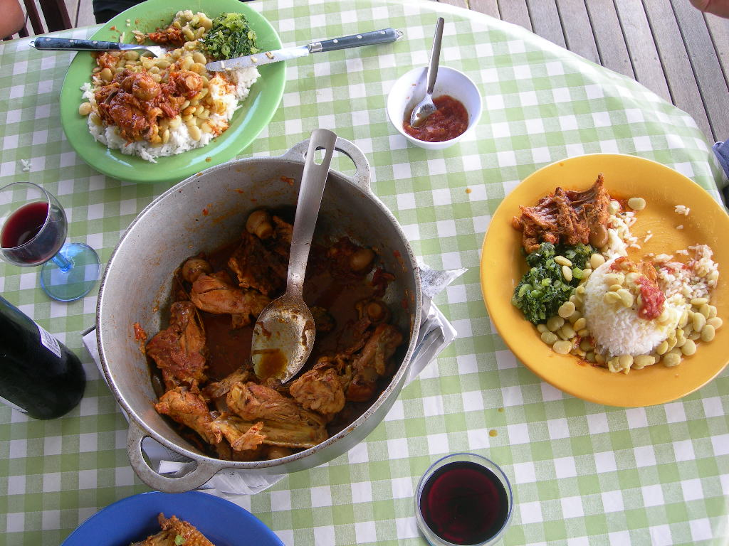 Carri poulet à La Réunion